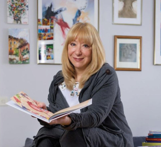 Українська дитяча письменниця Наталя Гузєєва